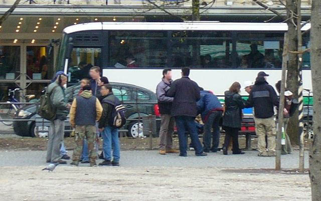 Mutmaßlicher unerlaubter Handel mit Betäubungsmitteln (sog. Ameisenhandel) in München, Orleansplatz (ehem. Szene)